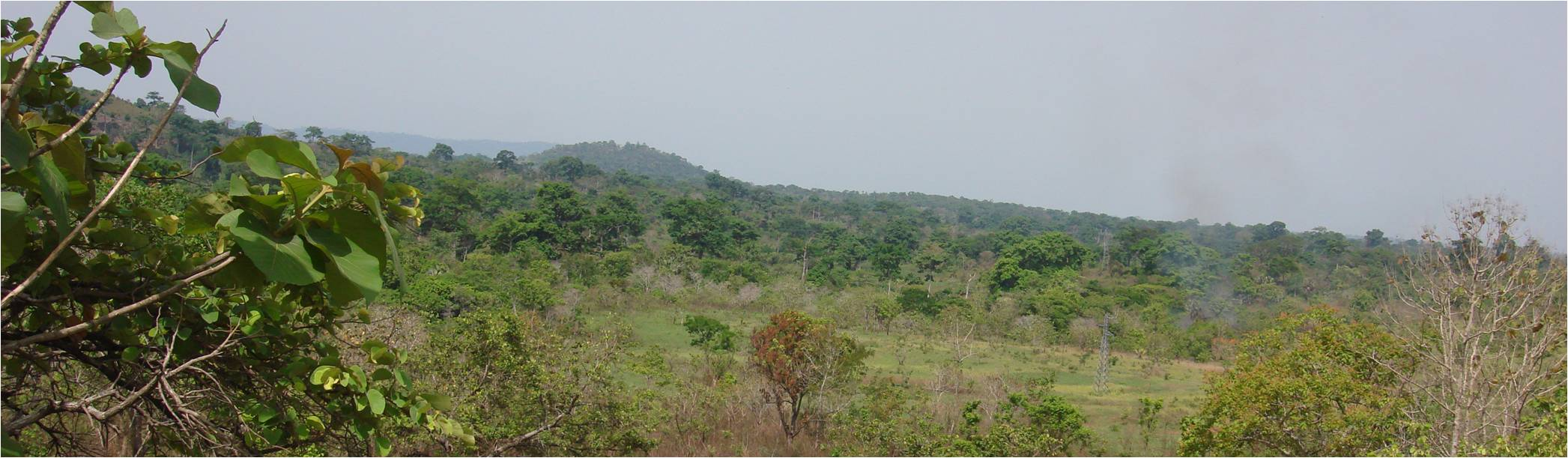 Savane arborée et colline (Côte d'Ivoire)